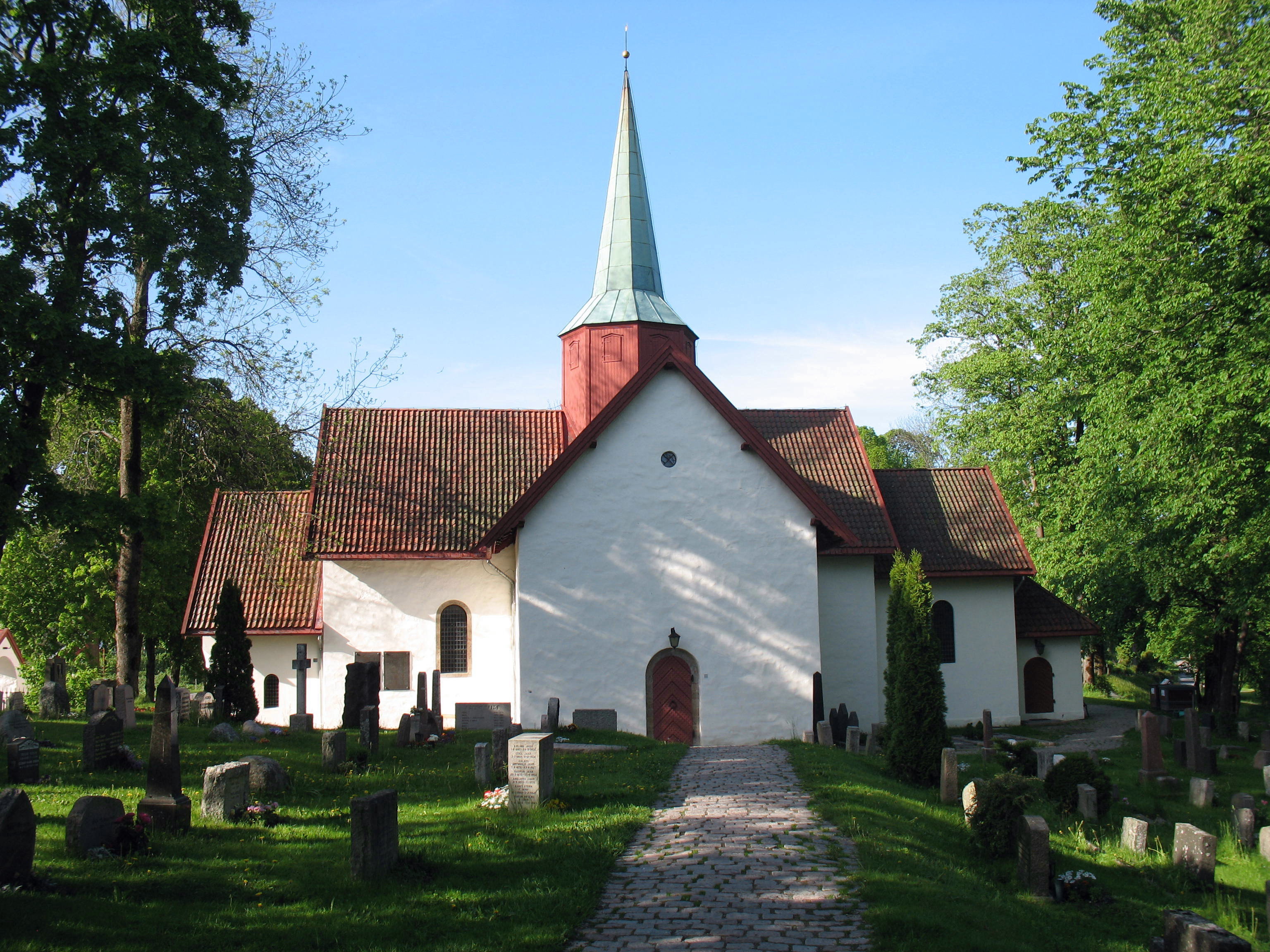 Haslum kirke er en korskirke fra ca. 1190 i Bærum